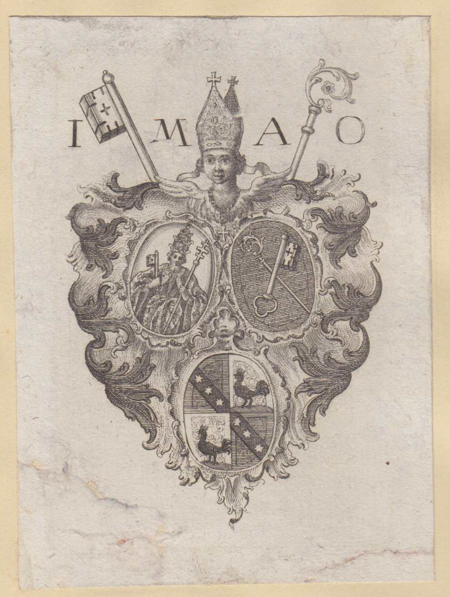 Ex libris, Kloster Oberaltaich, Abt Josef Maria Hiendl (Abt 1772–1796)